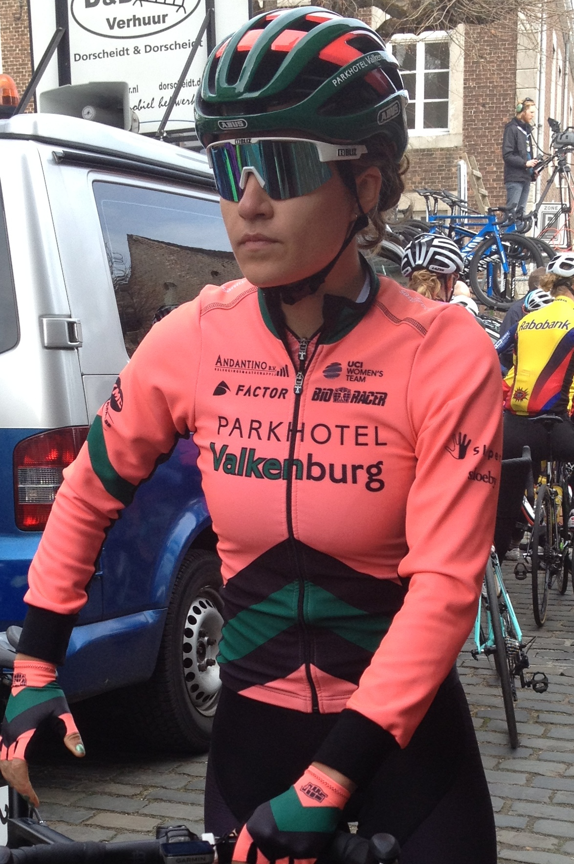 Volta Limburg Classic 2019 voor vrouwen met start en finish in Eijsden, Limburg, Nederland